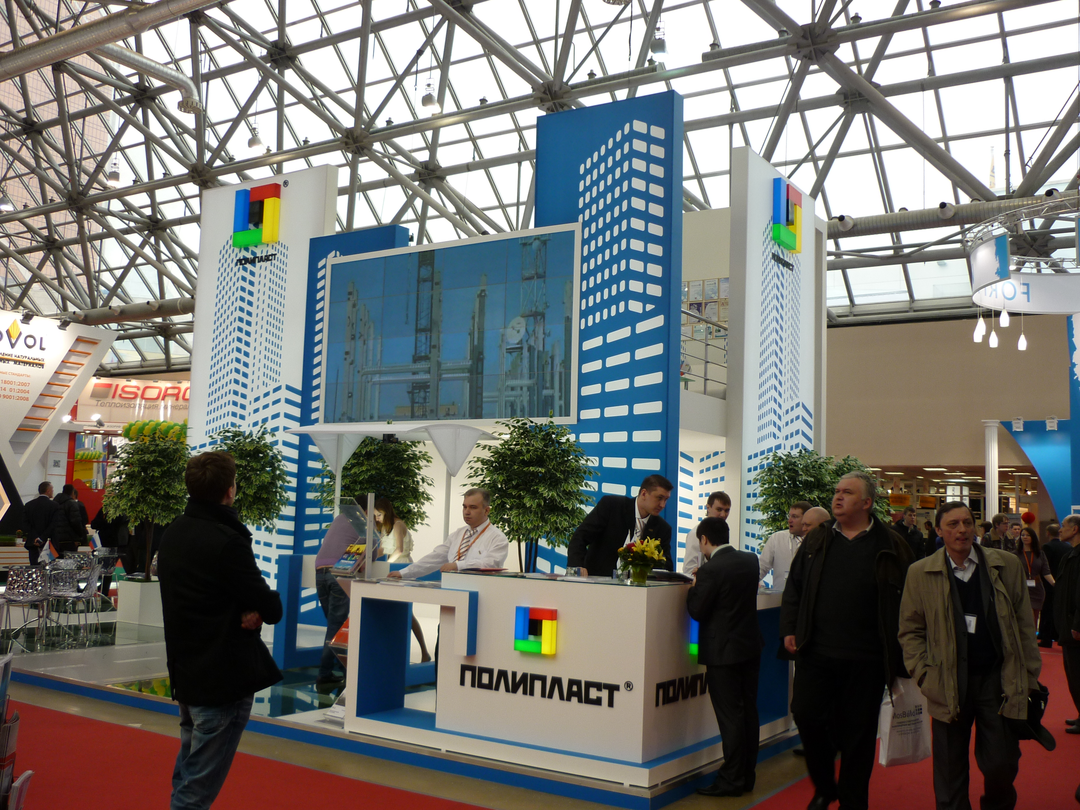 Компания Полипласт участвует в выставке MosBuild